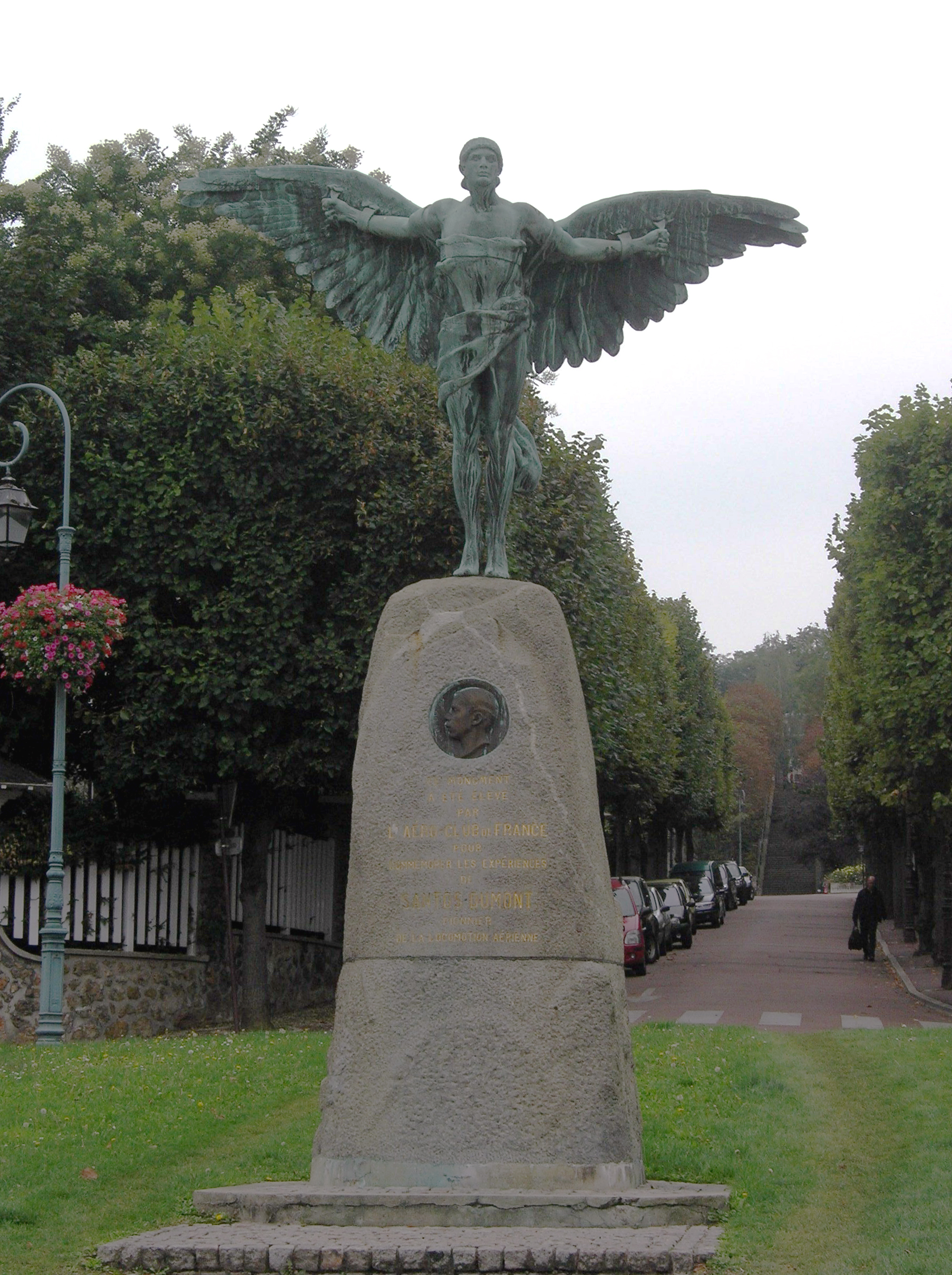 Georges Colin: Monument à Albert Santos Dumont (Icare), statue en pied (plâtre de 1913/14, bronze inauguré 1932), bronze, à Saint-Cloud, commémorant les expériences de Santos Dumont. Inscription sur le socle de la statue : "Ce monument à été élevé par l'aéro-club de France pour commémorer les expériences de SANTOS DUMONT pionnier de la locomotion aérienne".